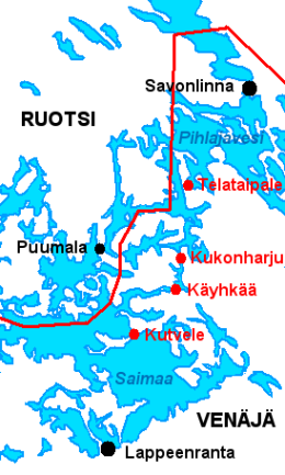 Kartta Suvorovin sotakanavista Saimaalla. Kanavat rakennettu 1790-luvulla.